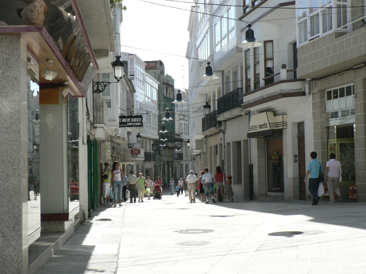 Ruas de Betanzos